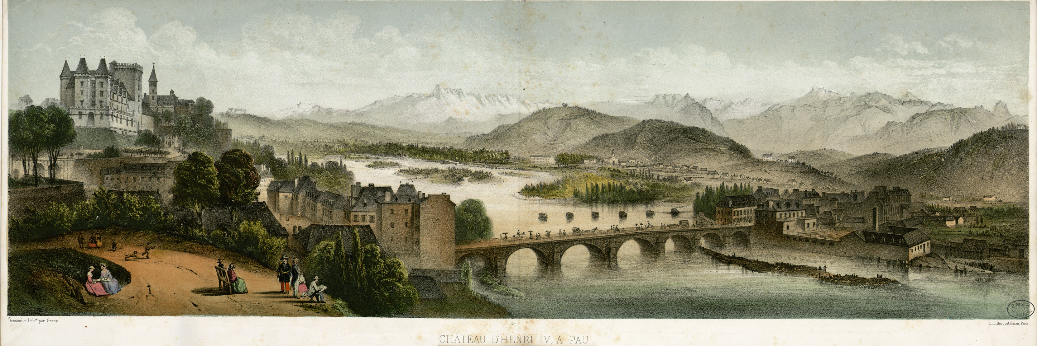 Fait partie d'un recueil comprenant 13 planches dessinées et lithographiées par Gorse, chez Becquet imprimeur lithographe à Paris. La lithographie numérotée 1 est double. Ancely, René (1876 - 1966). Possesseur